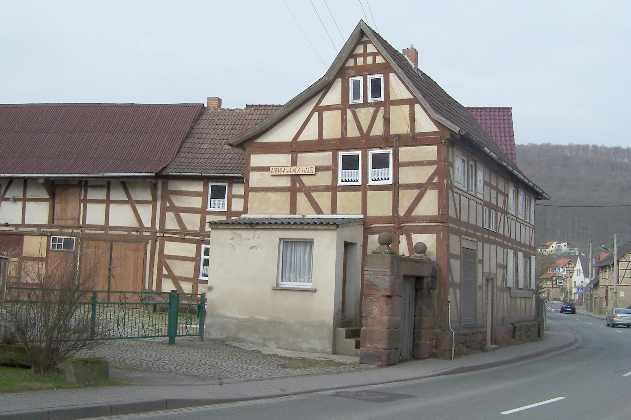 Merkers-Kieselbach